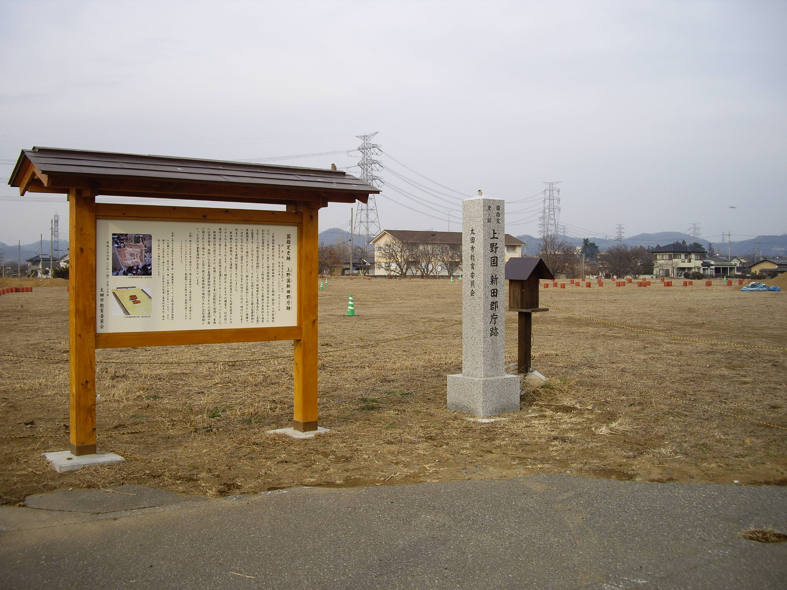 上野国新田郡庁跡（群馬県太田市）